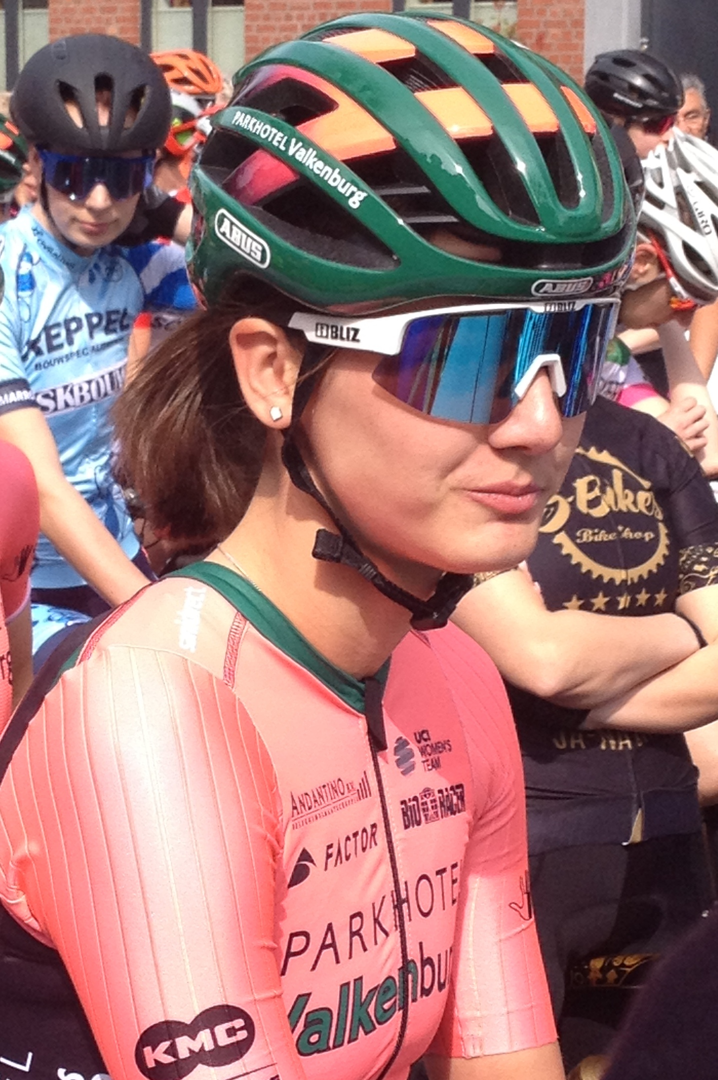 Volta Limburg Classic 2019 voor vrouwen met start en finish in Eijsden, Limburg, Nederland